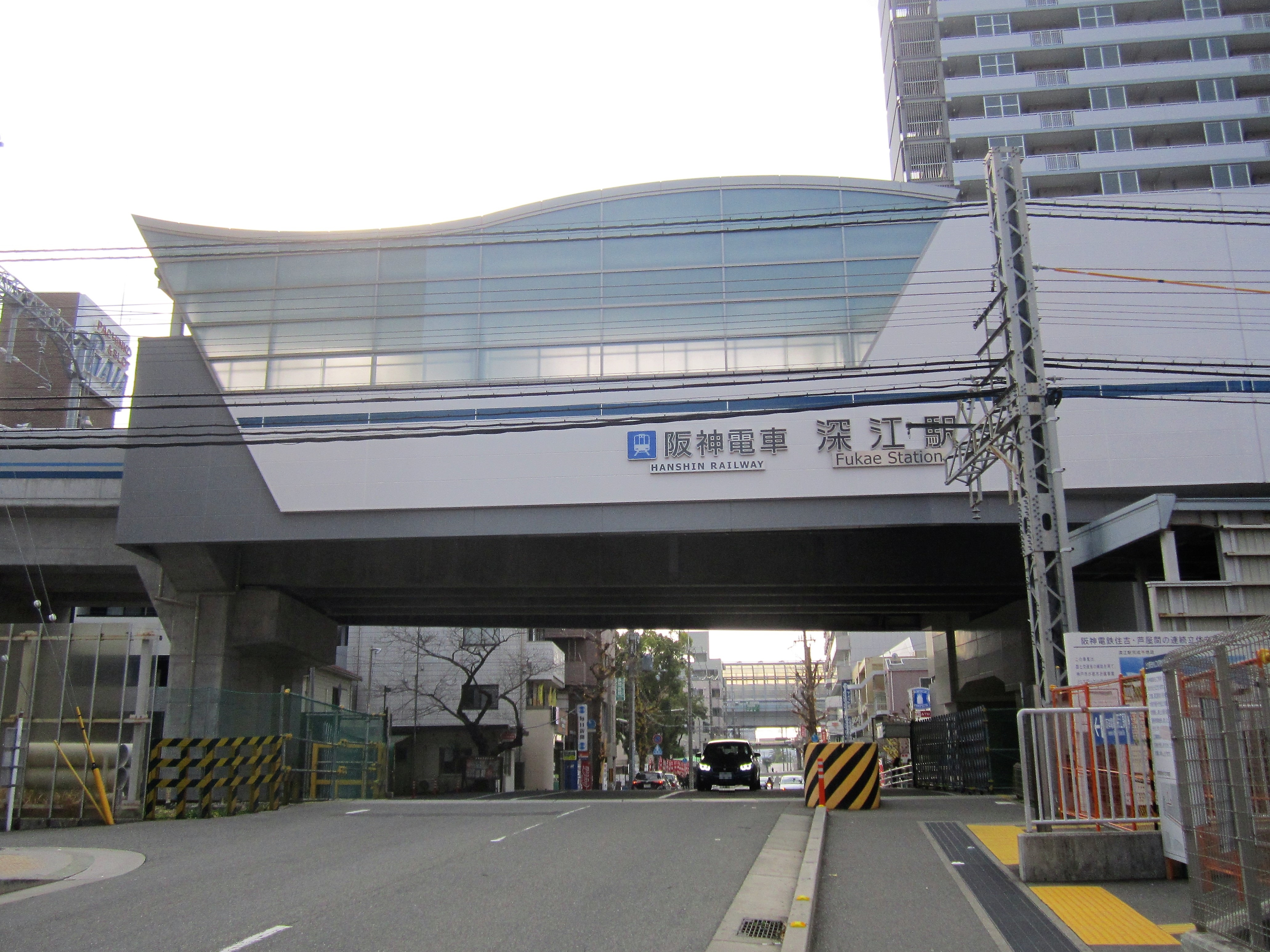 上下線高架化完成後の阪神・深江駅（2020年1月撮影）